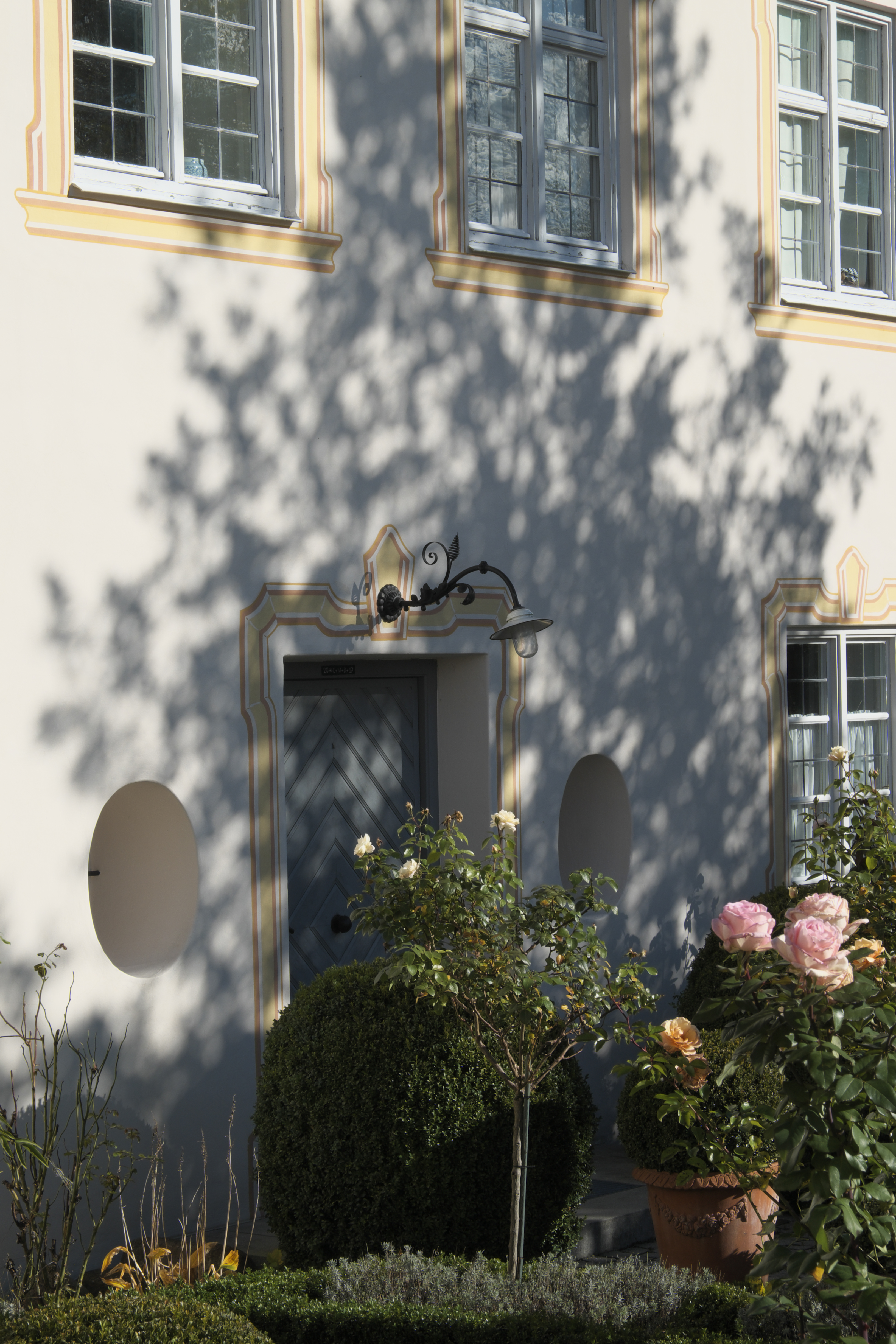 Pfarrhaus in Epfach (Denklingen) im Landkreis Landsberg am Lech (Bayern/Deutschland)